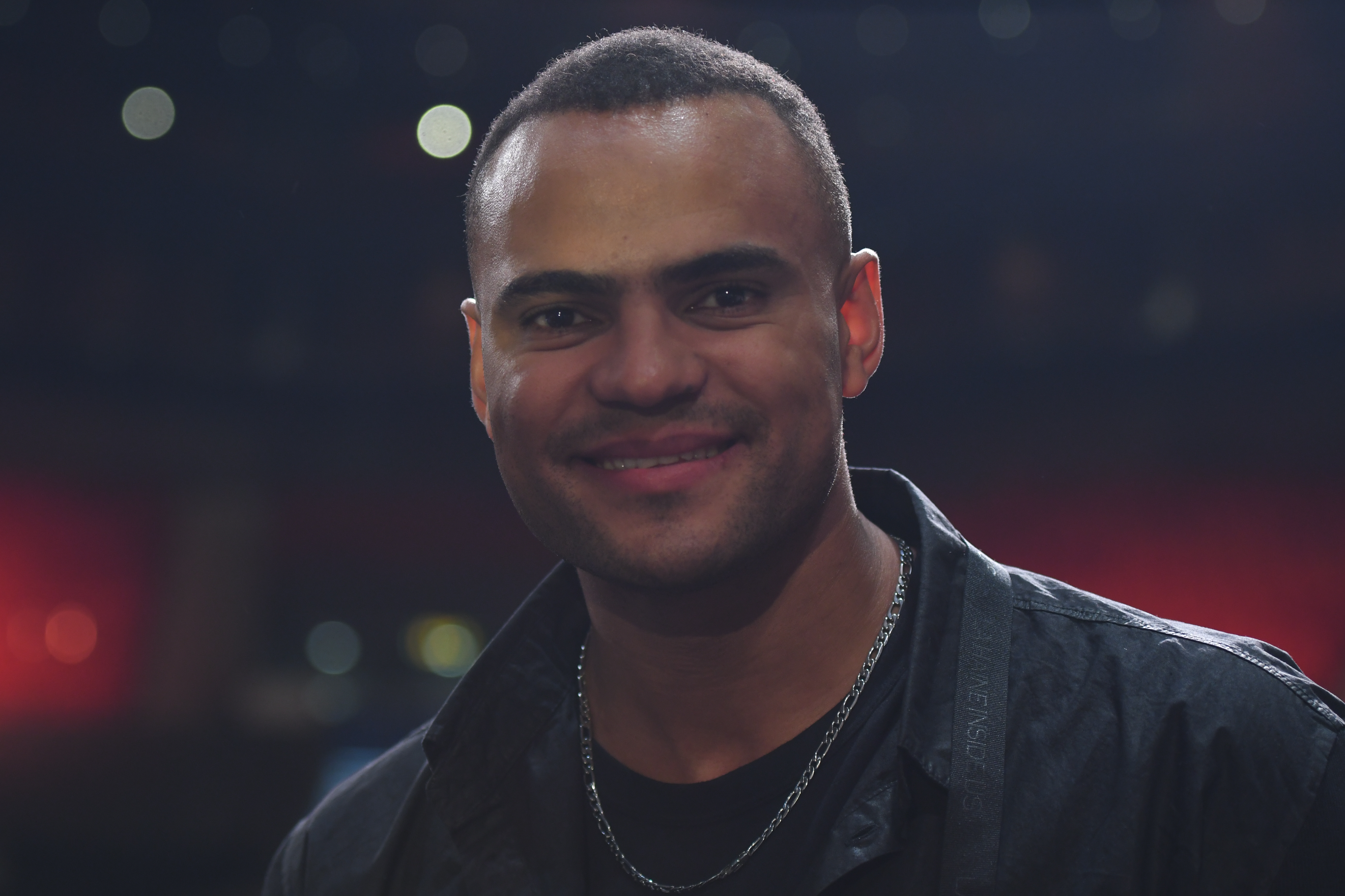 Melodifestivalen 2019, deltävling 1, Scandinavium, Göteborg, Mohombi